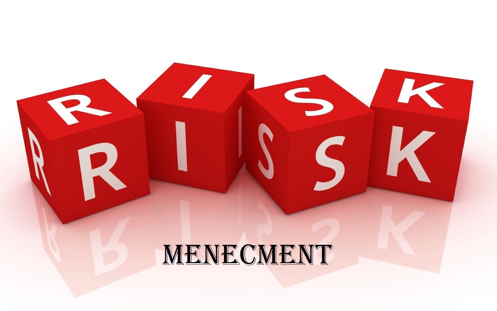 Risk menecment